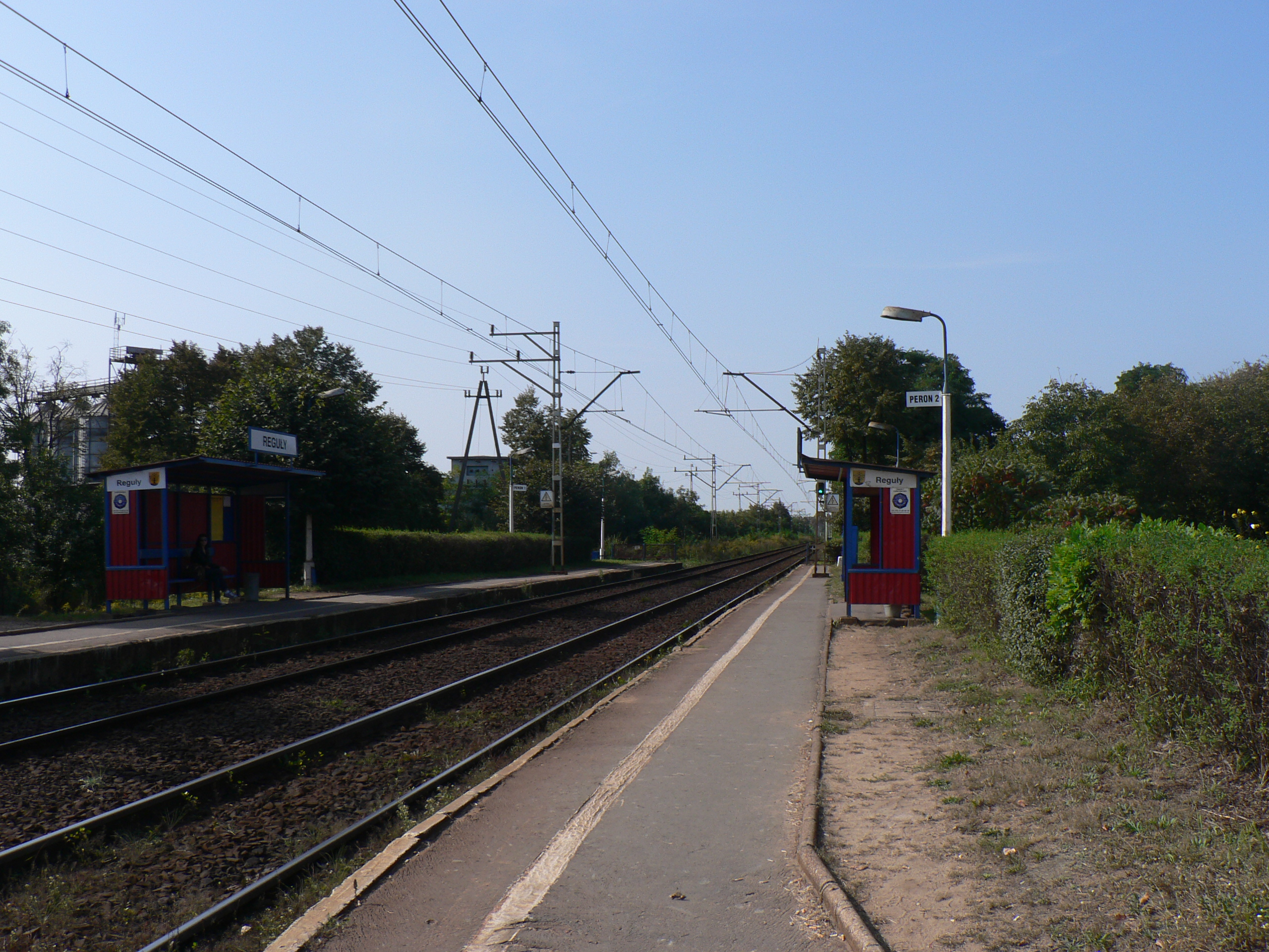 Stacja WKD w Regułach